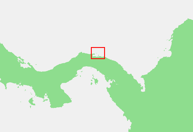 San Blas Islands, Panama